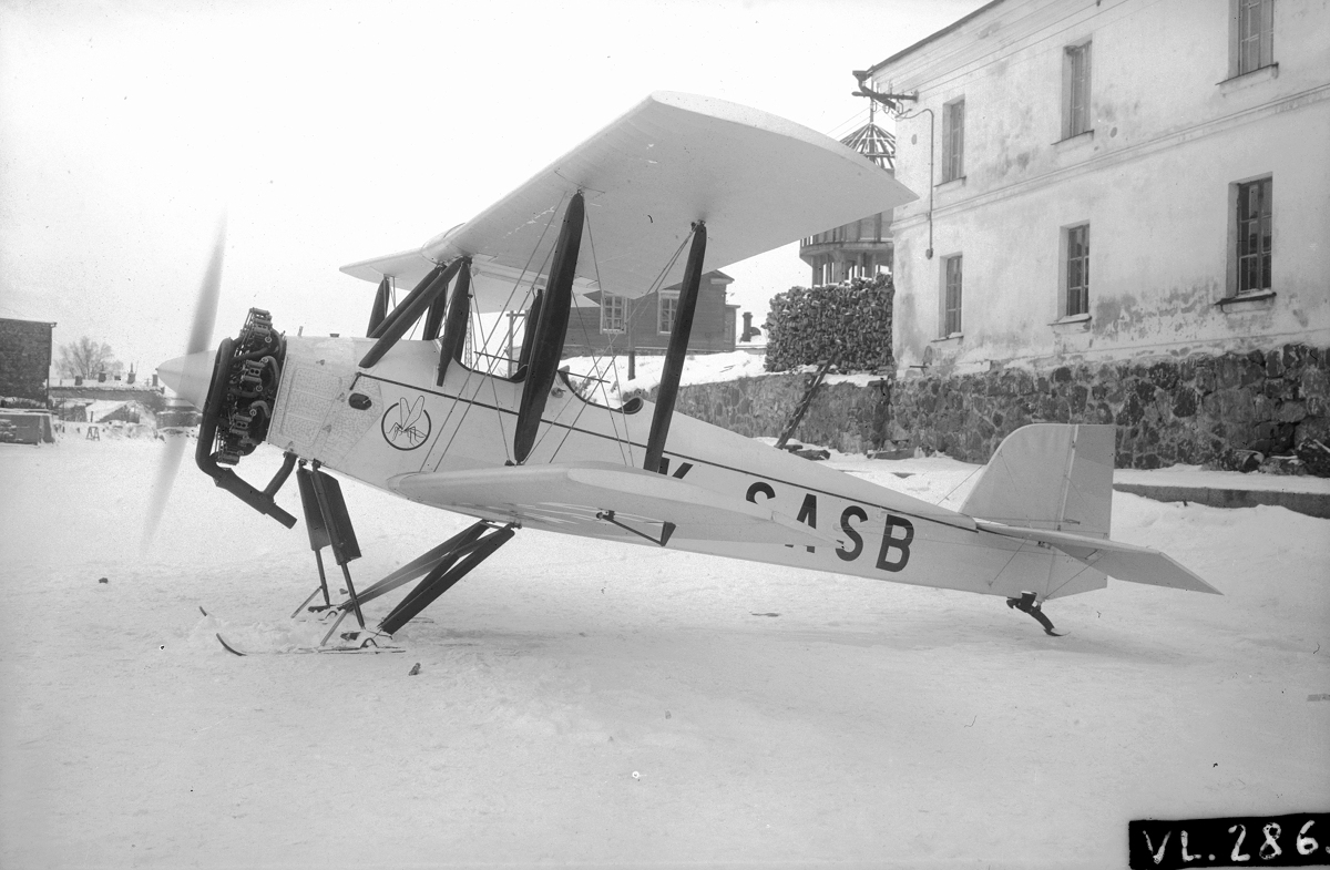 Sääski II K-SASB Suomenlinnassa helmikuussa 1929. Kone lensi ensilentonsa 22.2.1929. Tämä oli ensimmäinen Ilmailuvoimien Lentokonetehtaan rakentama Sääski. Koneella lennettiin noin 1000 h ja koulutettiin valmiiksi ainakin 11 oppilasta. K-SASB poistettiin Ruotsissa tapahtuneen vaurioitumisen jälkeen vuonna 1931.